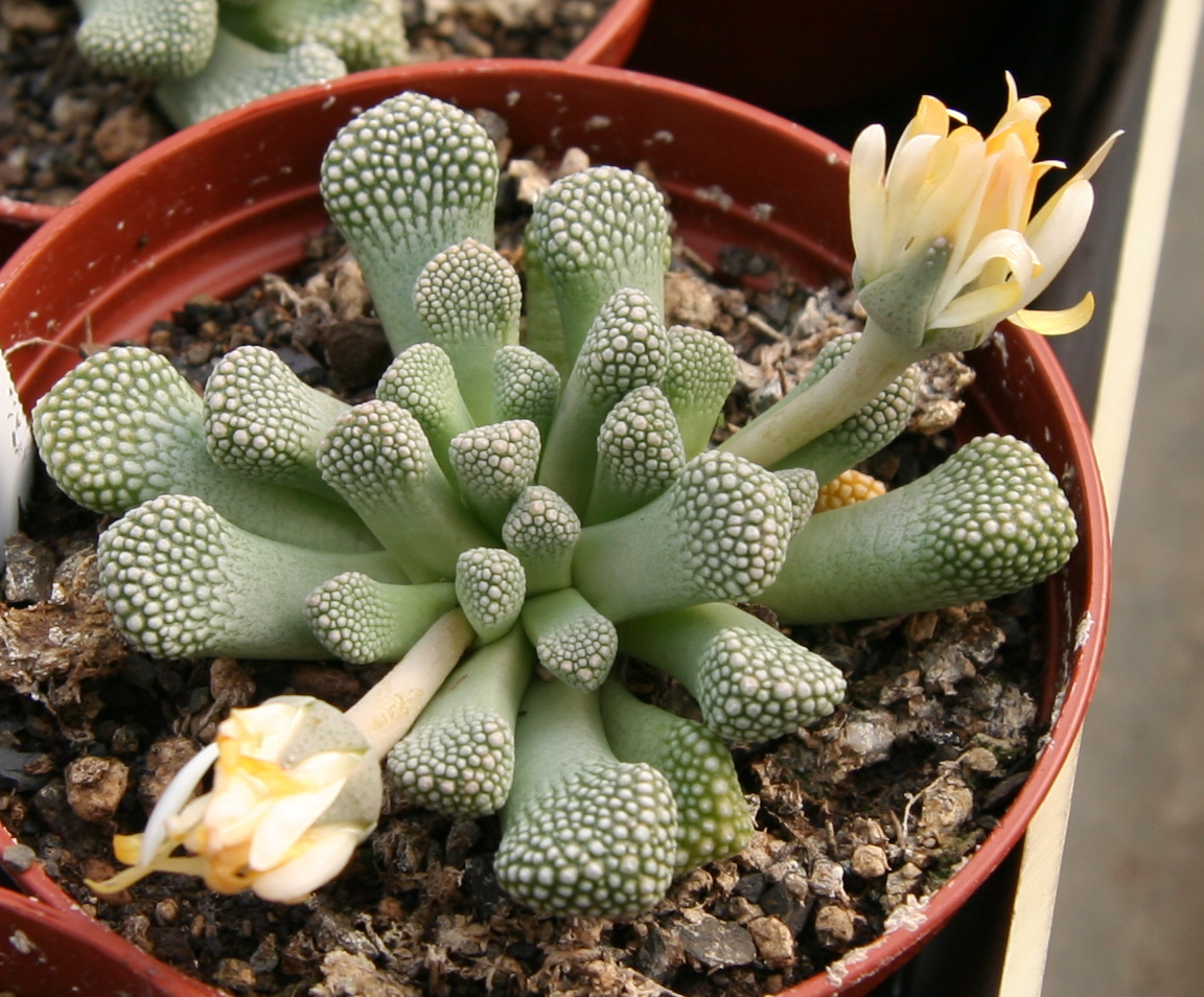 Titanopsis primosii in Kultur bei Kakteen-Haage in Erfurt